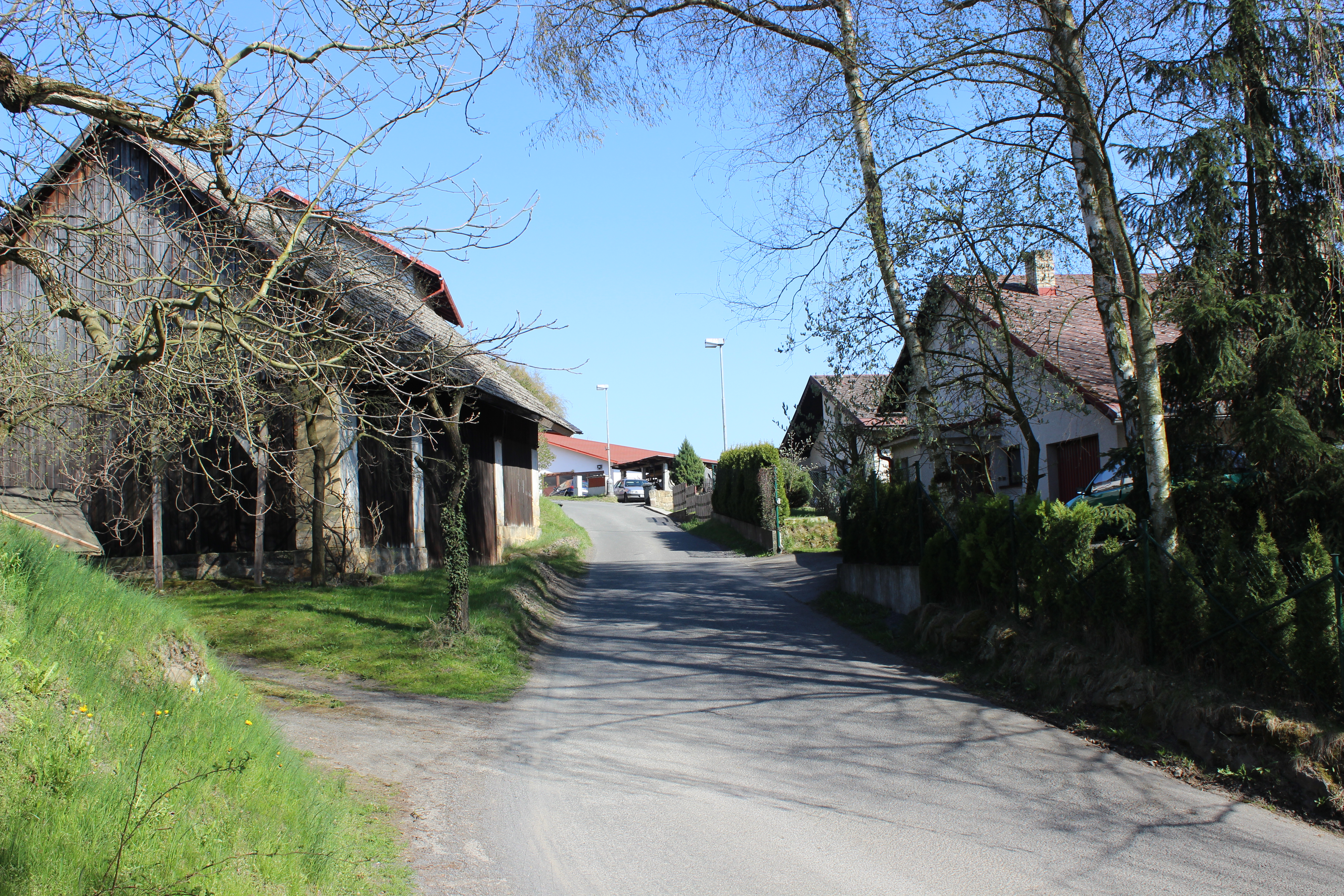 Místní silnice v Chitnovce, části Mírové pod Kozákovem.